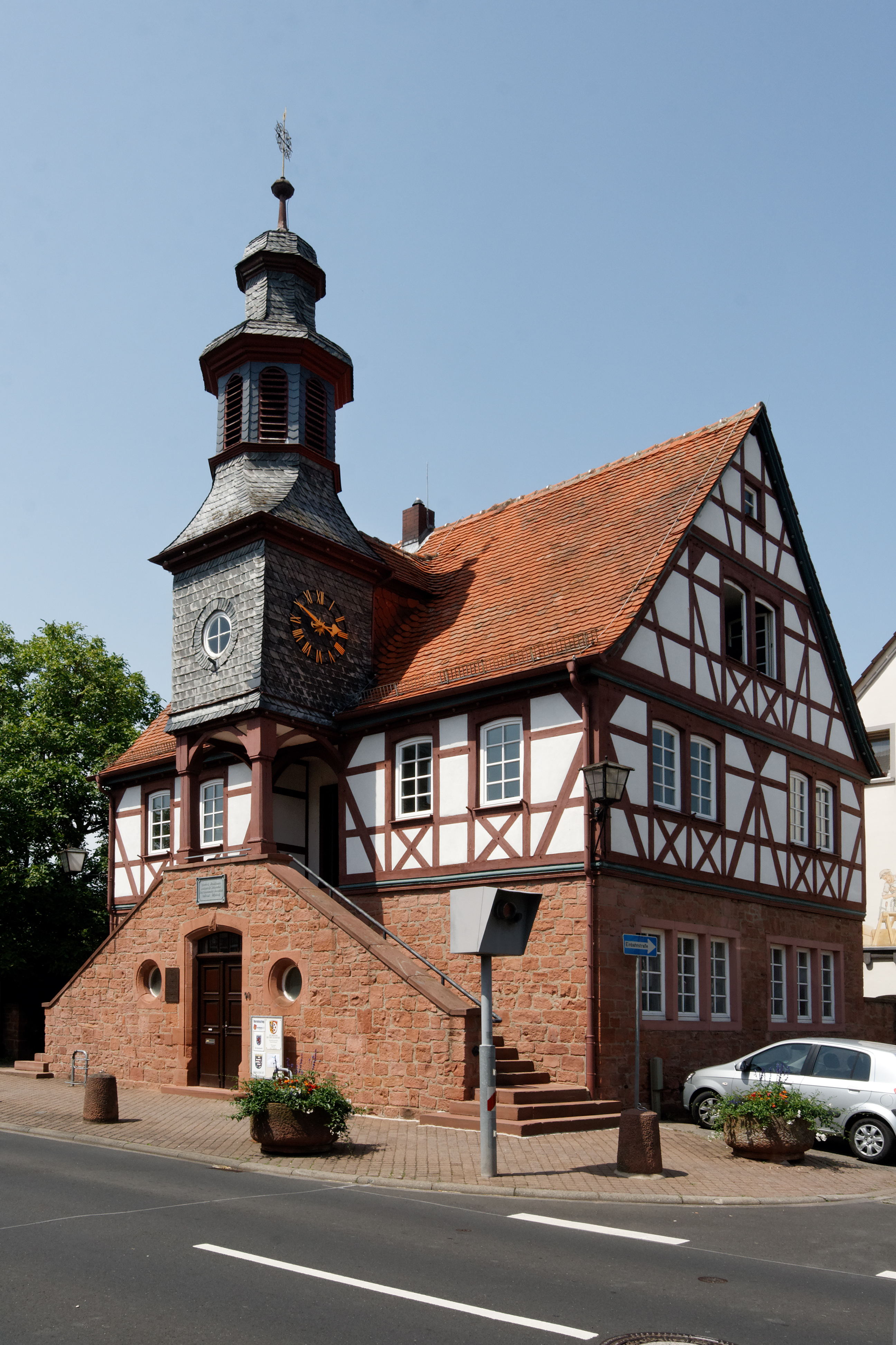 Rathaus in Froschhausen, einem Stadtteil von Seligenstadt (Hessen).